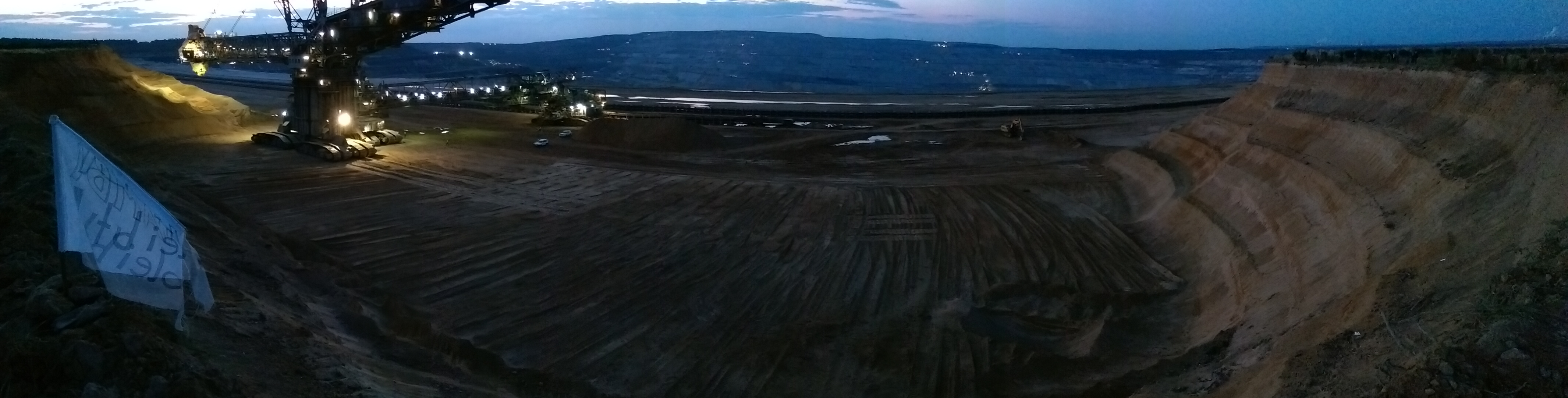 Schaufelradbagger in der Grube beim Hambacher Forst mit Abbruchkante. Links zu sehen ist ein Demo-Transparent. Panoramafoto aufgenommen während der Anti-Kohle-Demo vom 06.10.2018.